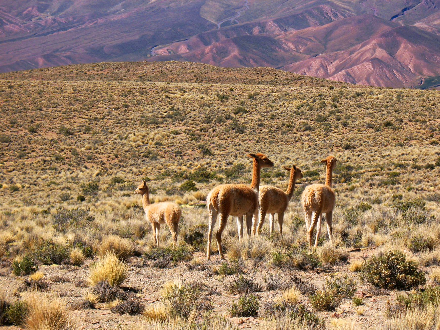 Fotografía tomada en la provincia de Jujuy